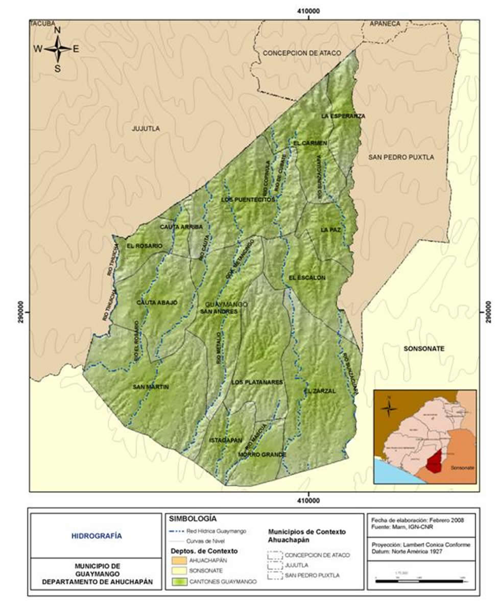 Hidrografia del Municipio de Guaymango